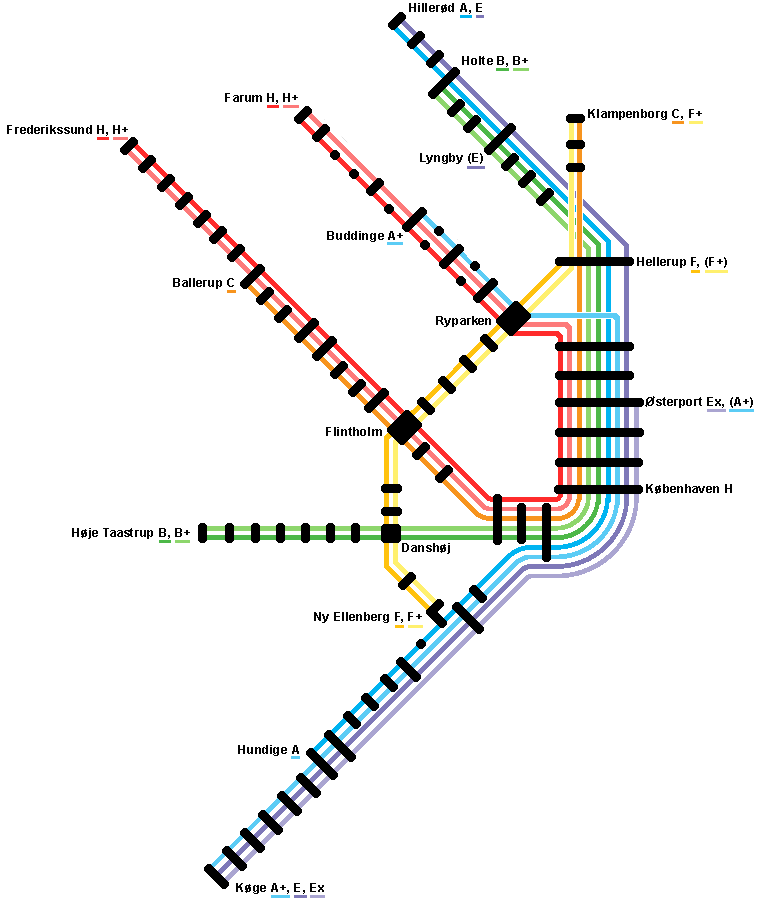 Bildbeschreibung: Liniennetz des S-tog Kopenhagen Quelle: selbst gezeichnet auf Basis von der Webseite Fotograf/Zeichner: WikiNight Datum: 15.2.2006